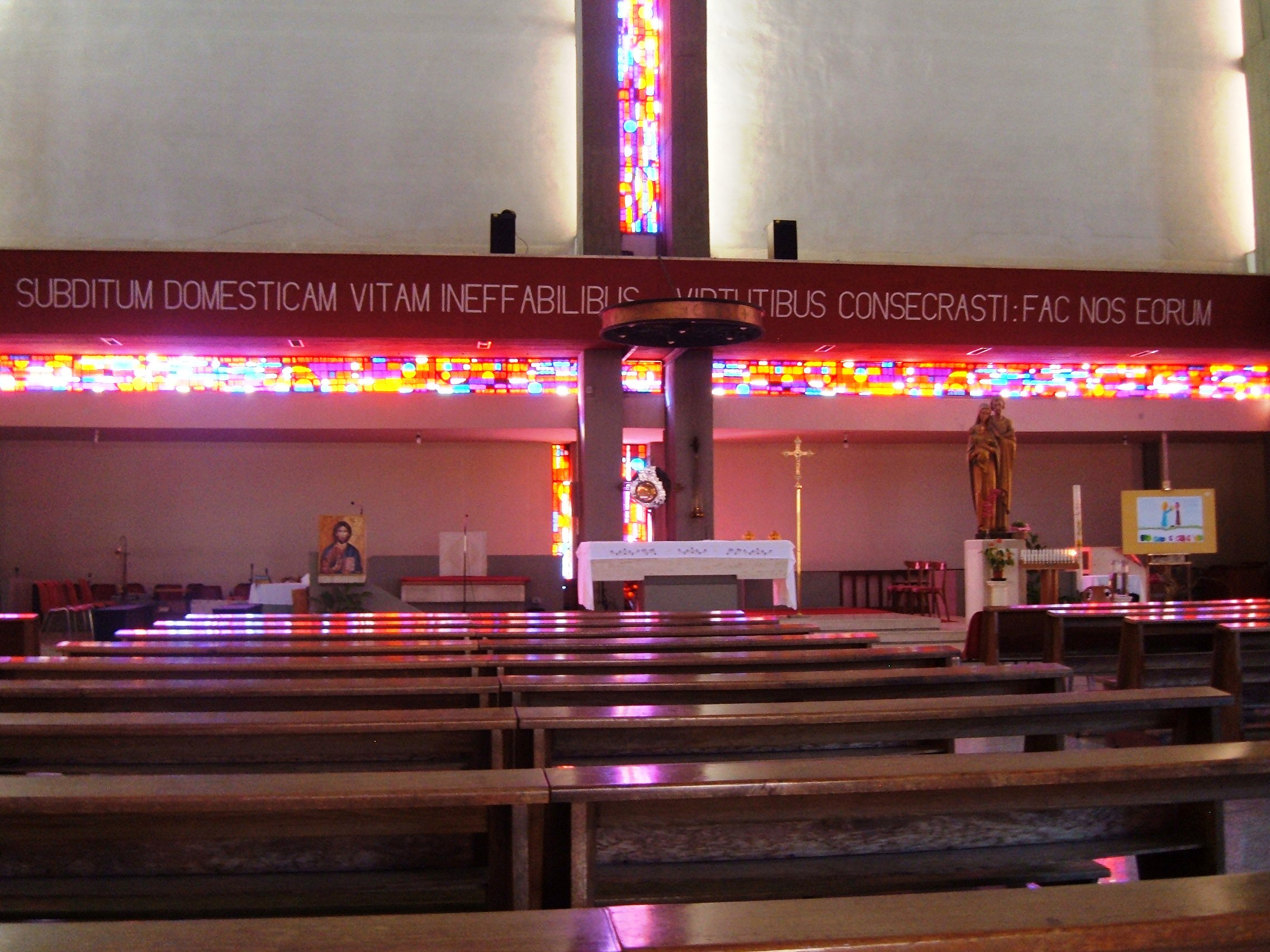 Chiesa della Sacra Famiglia di Nazareth, a Roma, nel quartiere Prenestino-Centocelle.